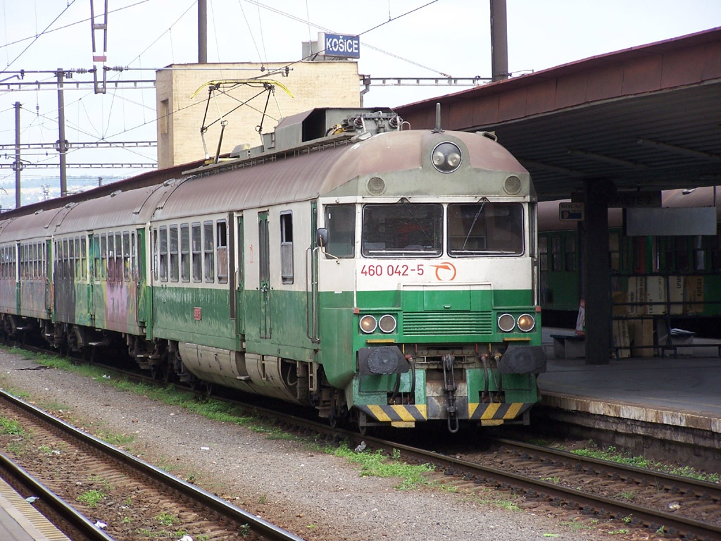 460-as motorvonat a Kassai fő‘pályaudvaron